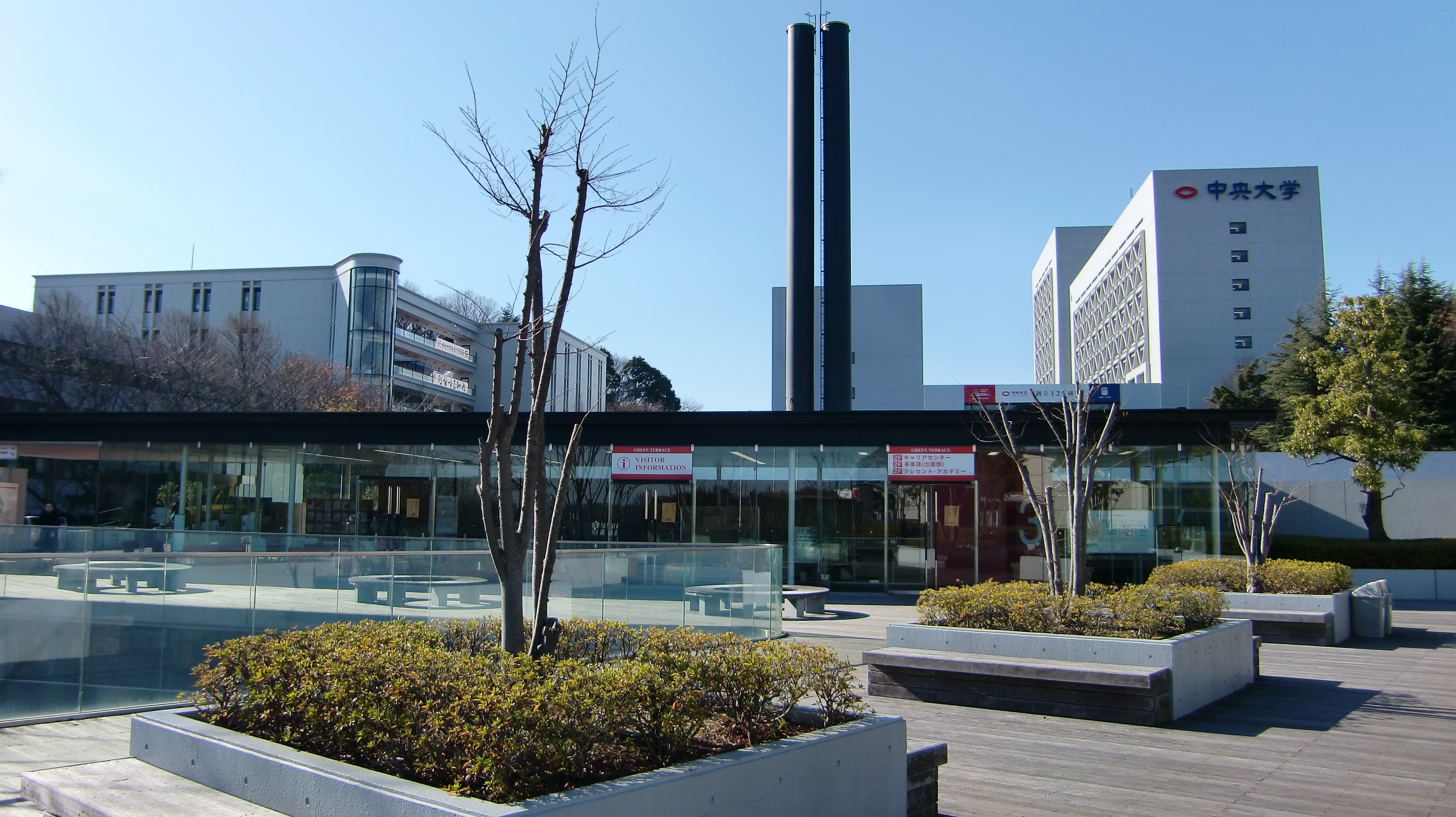 中央大学多摩キャンパス東門（中央大学駅）より